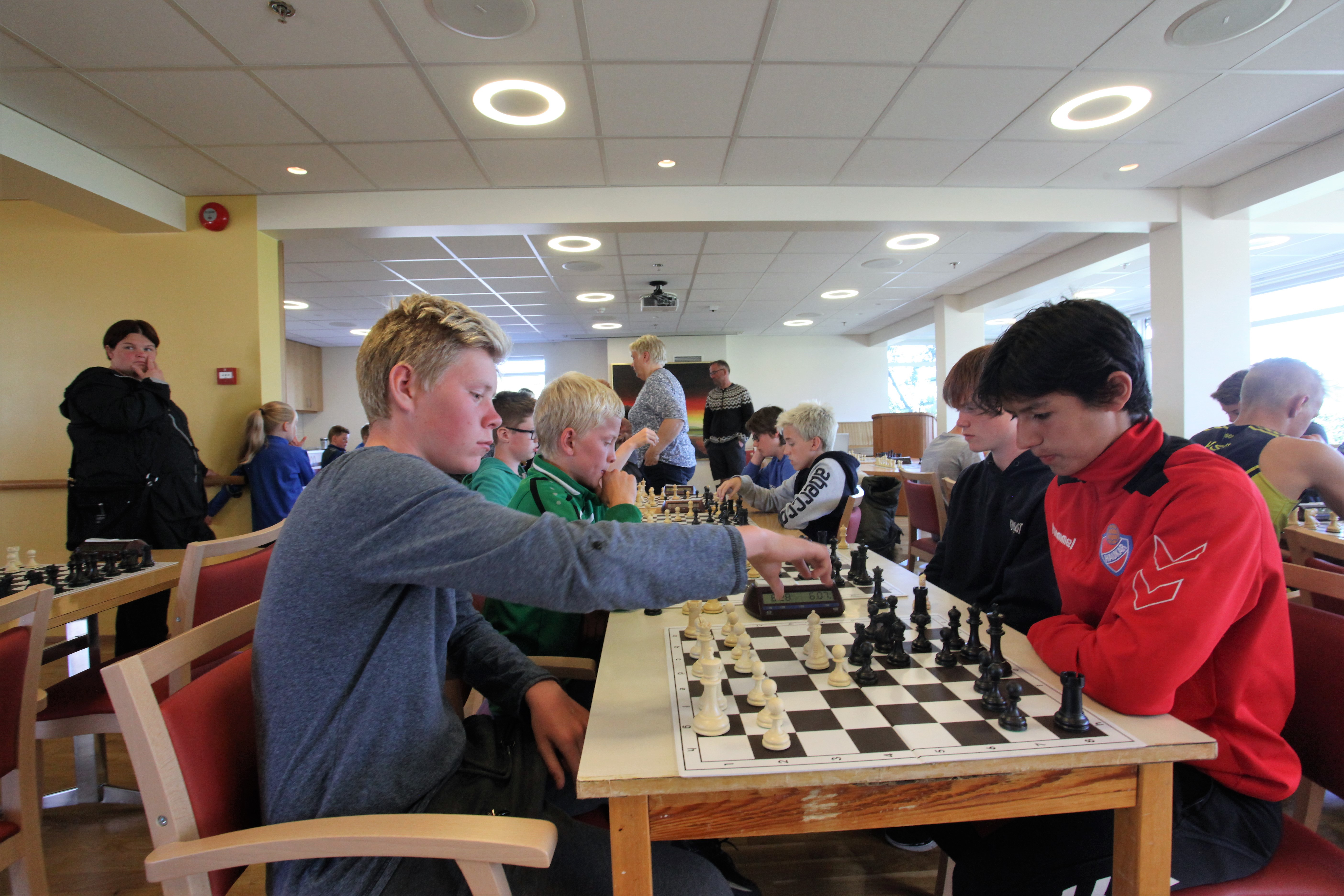 Keppt í skák á Unglingalandsmóti UMFÍ í Borgarnesi 2016.